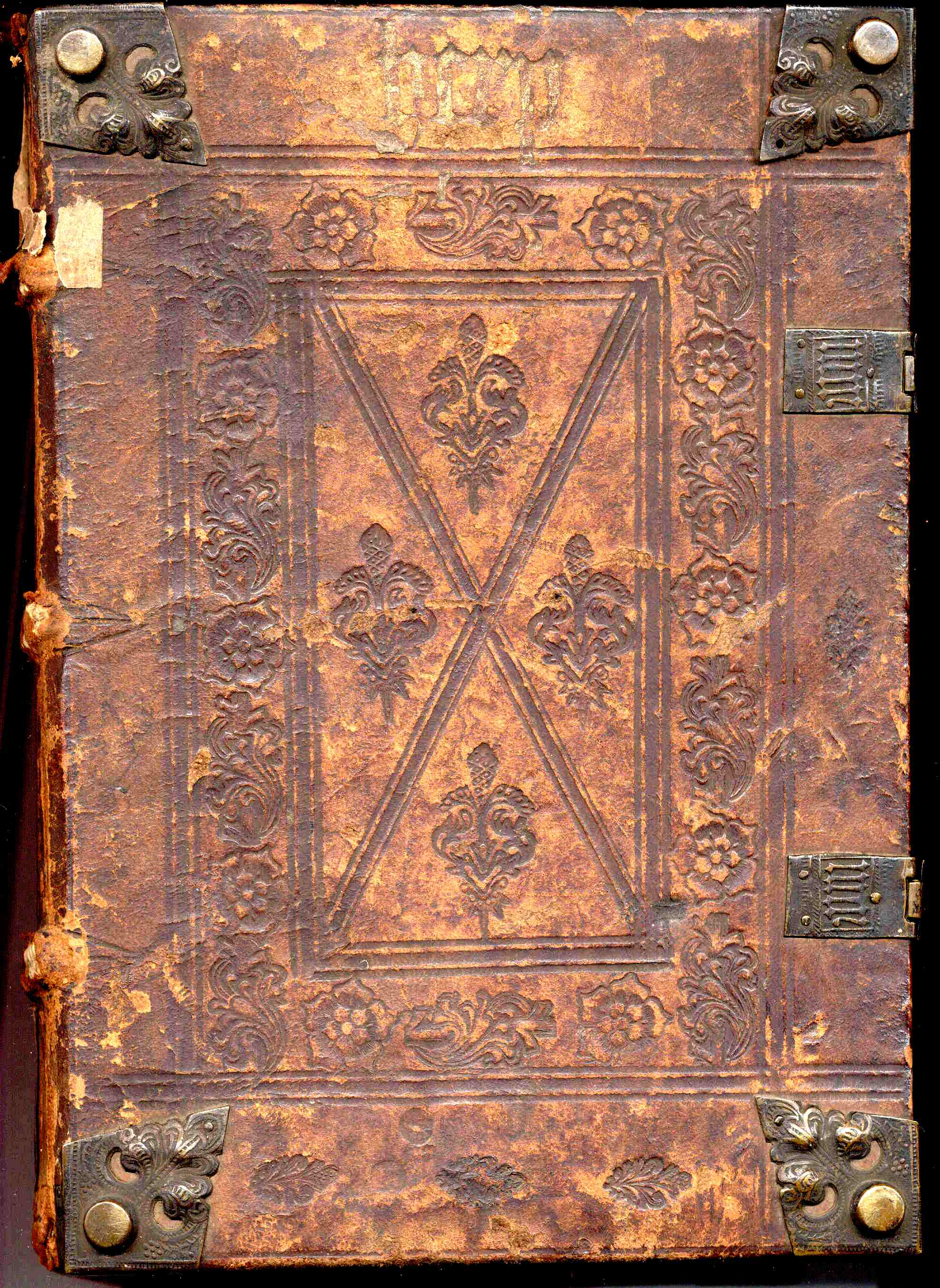 Bucheinband.15.Jh.r.Inkunabel.jpg